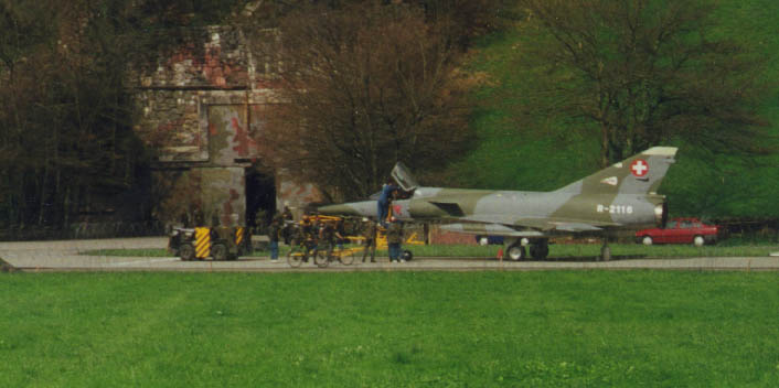 Das Bild zeigt eine Mirage III RS vor dem Äusseren Tor der Flugzeugkaverne Buochs Stollen Y